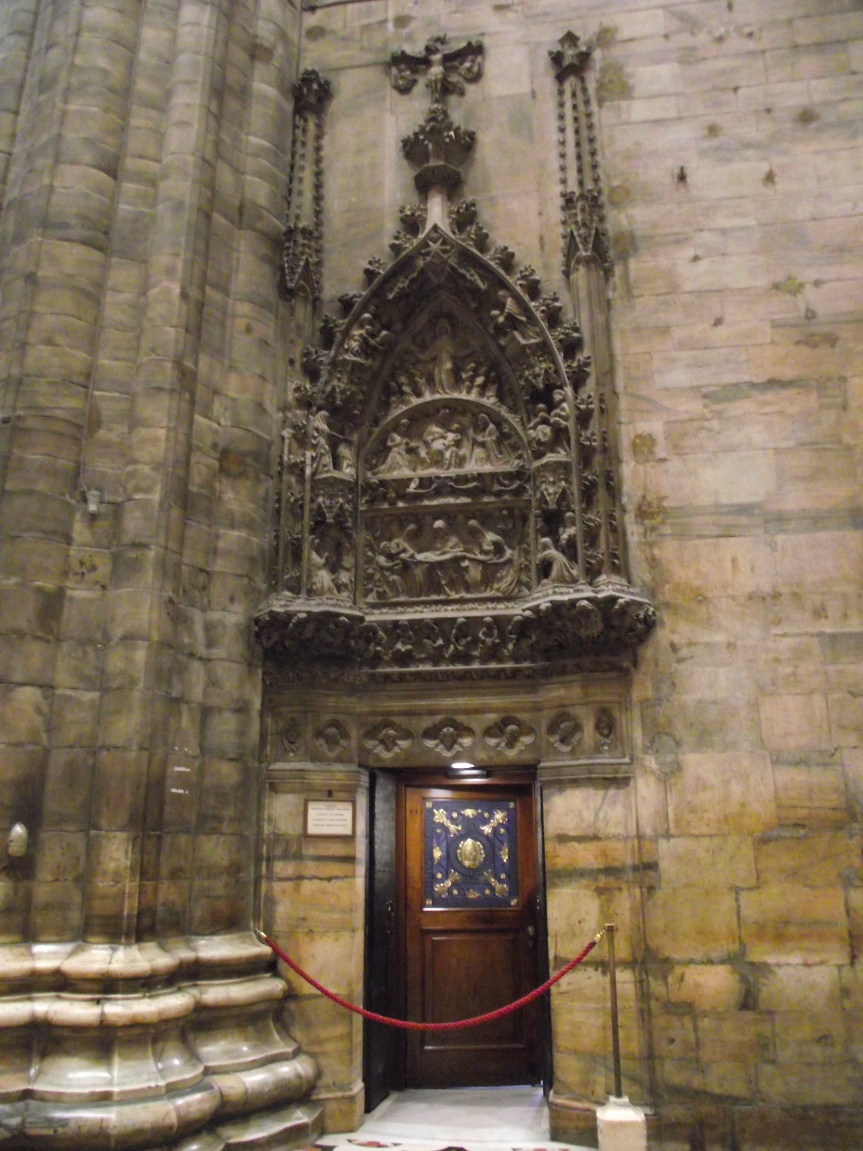 Portale della Sacrestia meridionale.